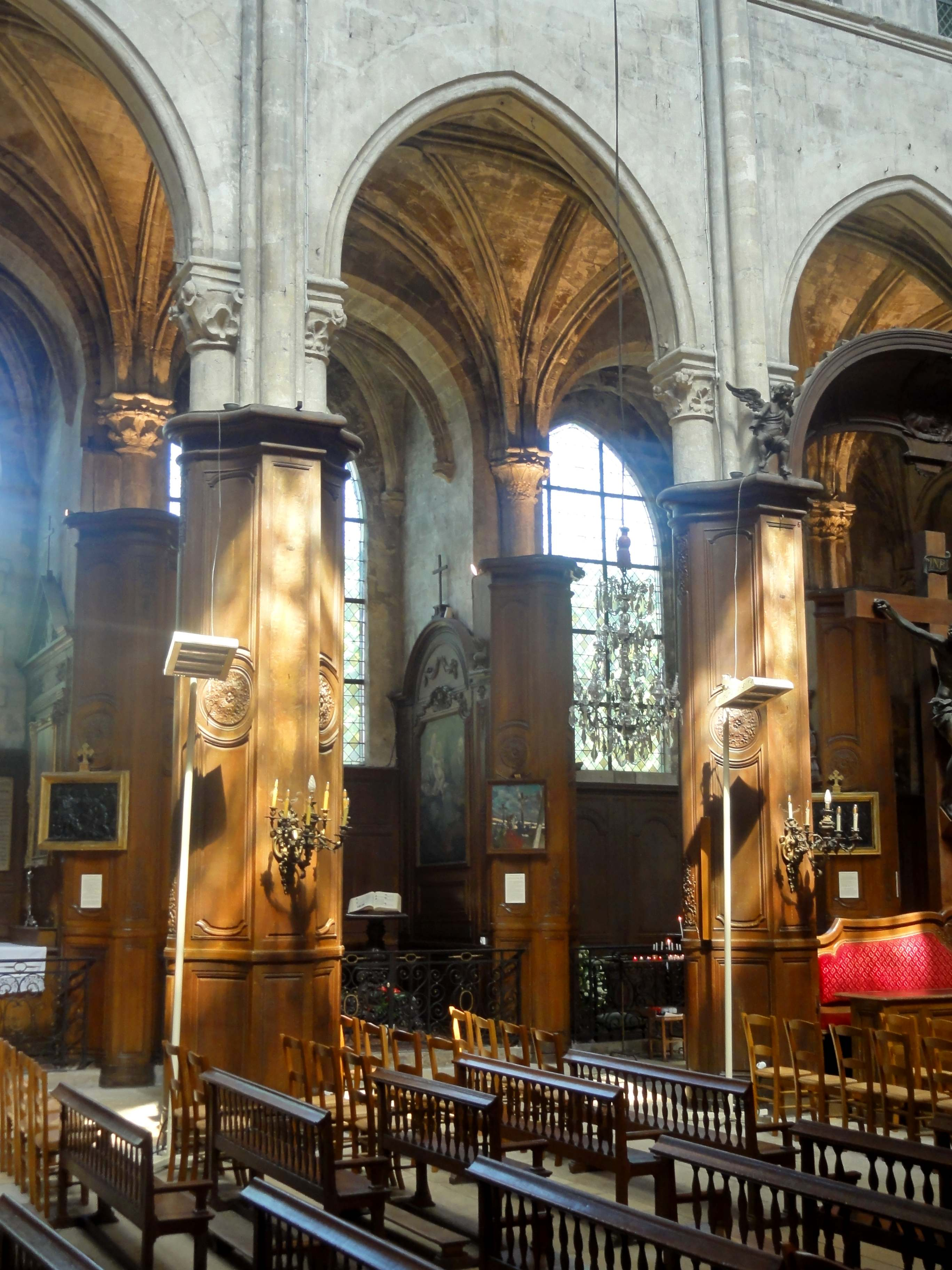 Nef de l'église - voir le titre du fichier.